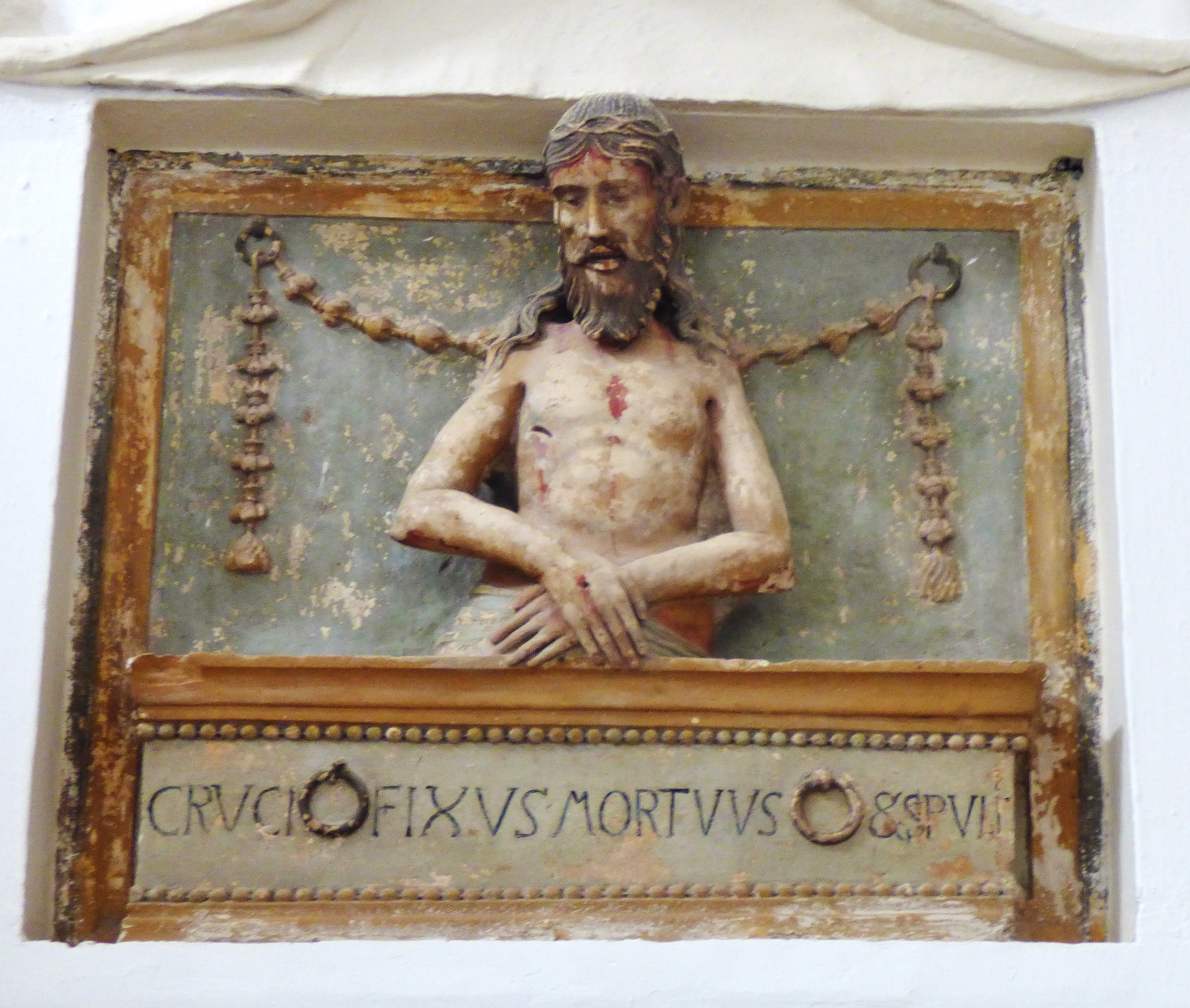 Cristo uscente dal sepolcro, pietra policroma, XVI secolo, Raimondo da Francavilla, sagrestia della Collegiata Santissima di Ceglie Messapica (BR)